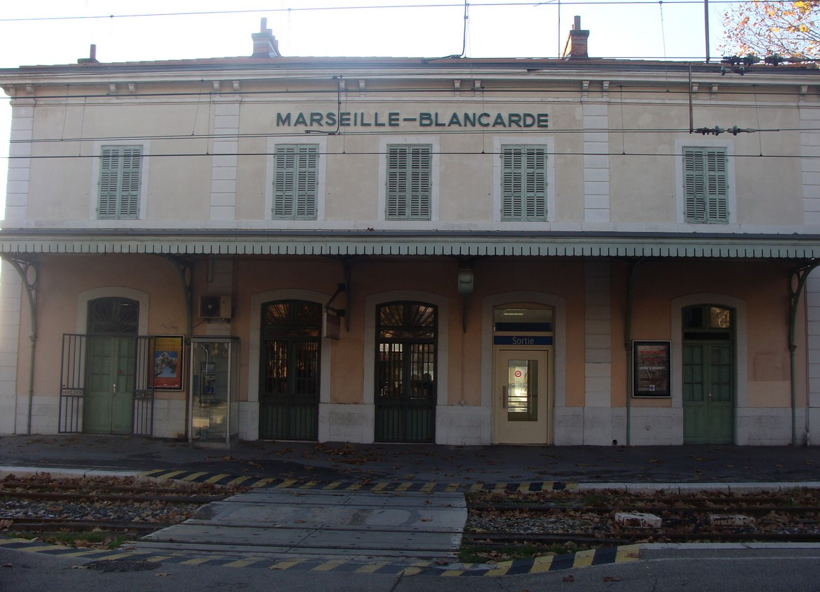 Gare de Marseille-Blancarde, façade côté voies